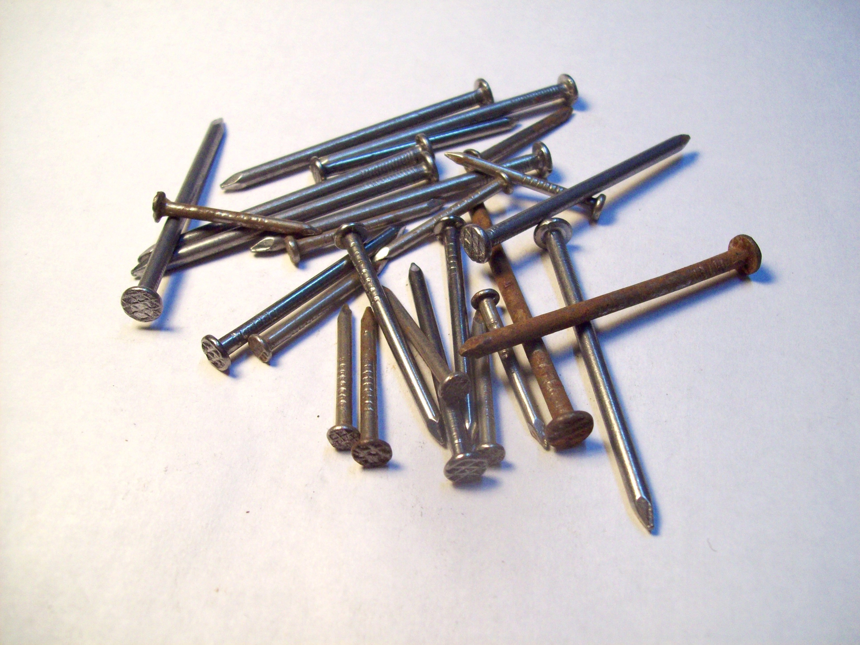 Clavos con cabeza de 1", 1 1/2" y 2" de largo.